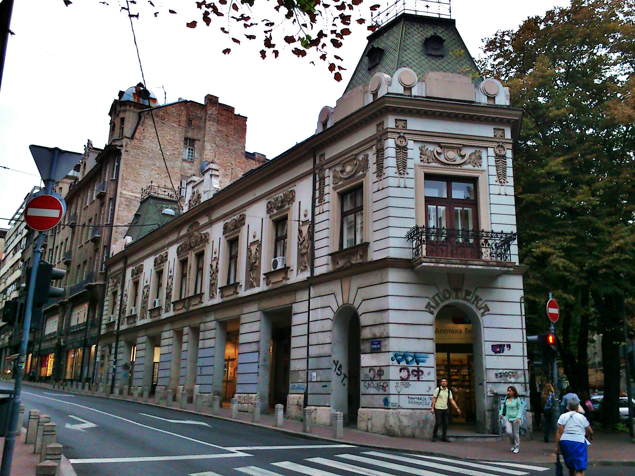 Кућа Јована Смедеревца